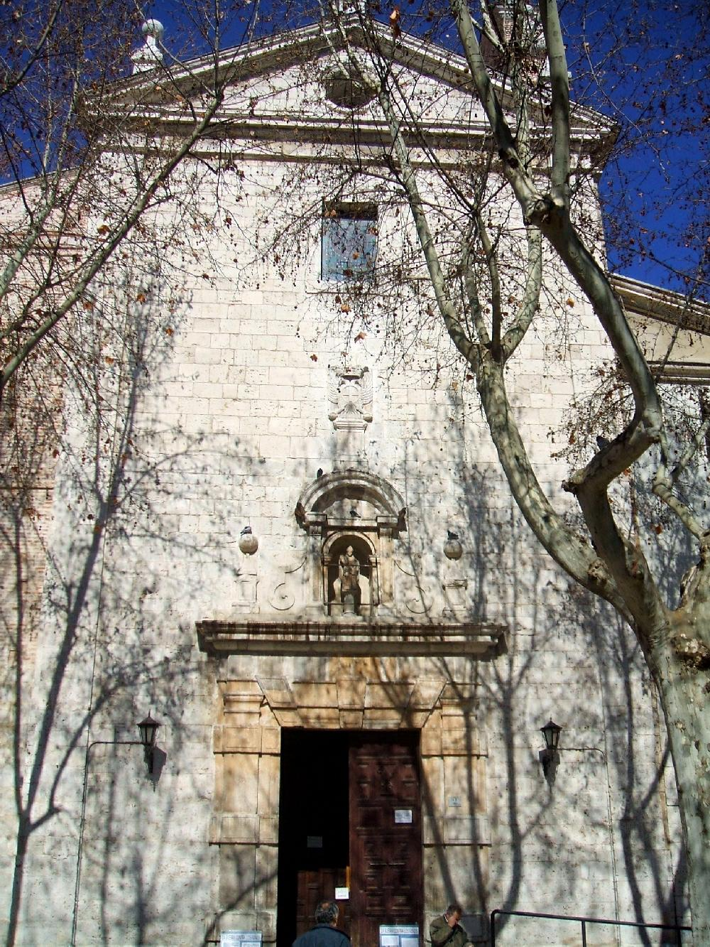 Iglesia de San Nicolás de Bari, Valladolid.